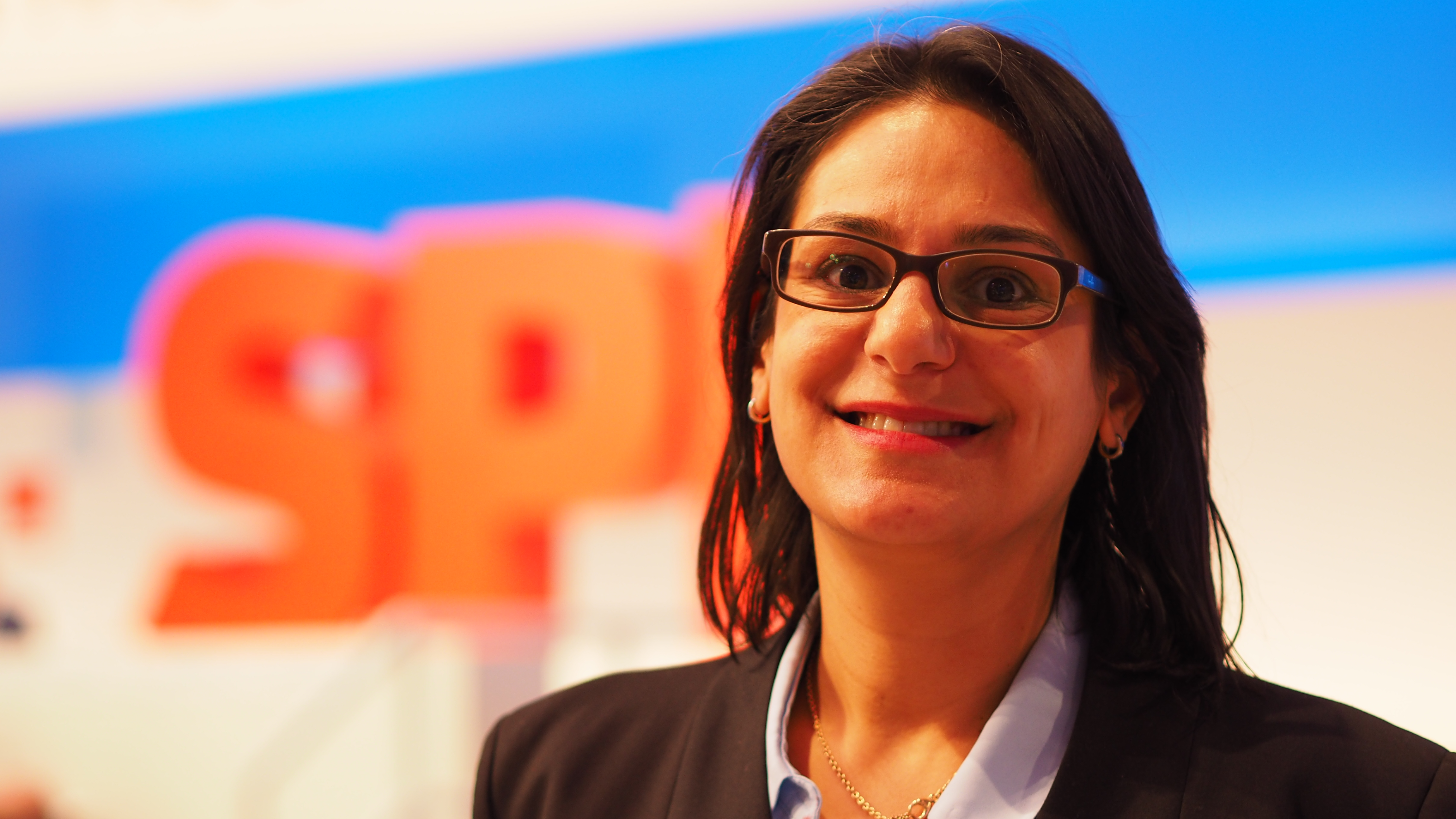 Serpil Midyatli SPD